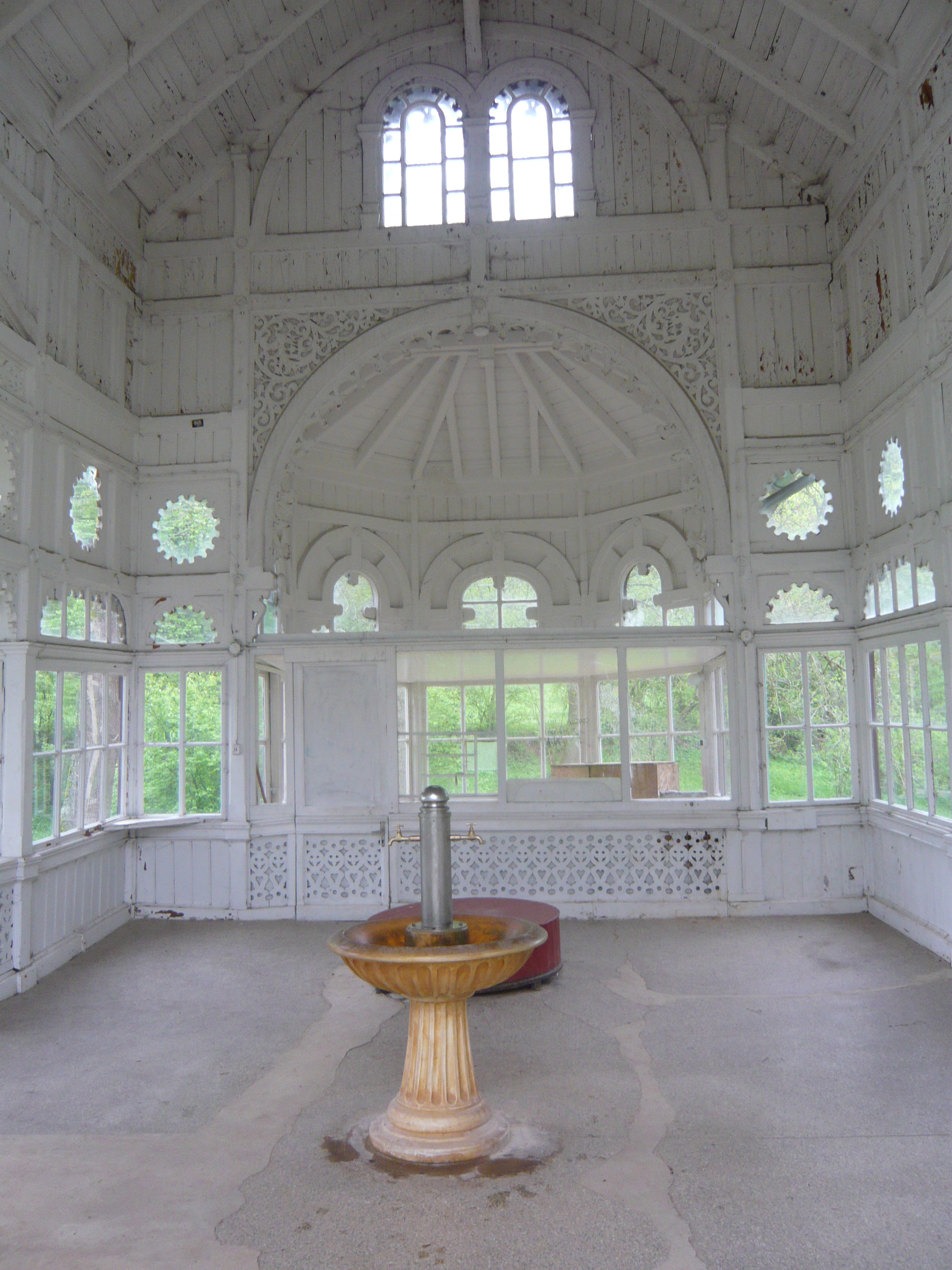 Rudolfův pramen, Mariánské Lázně